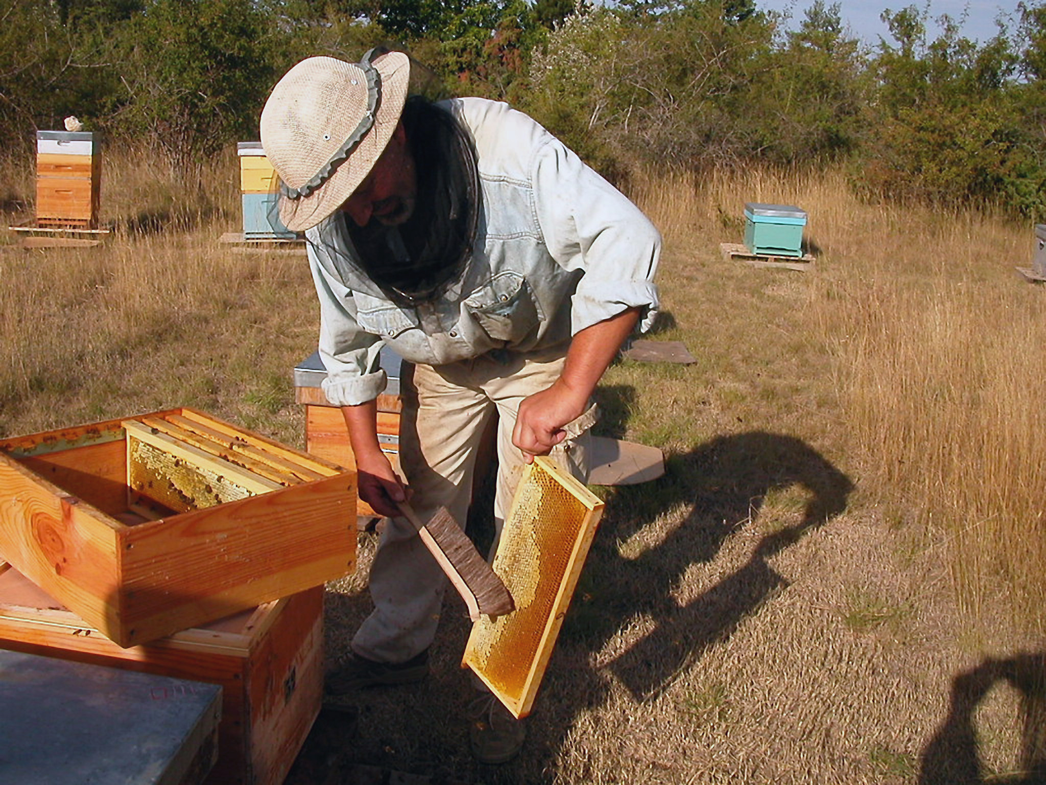 Apiculteur vérifiant la récolte de miel à Reillanne, Alpes de Haute Provence